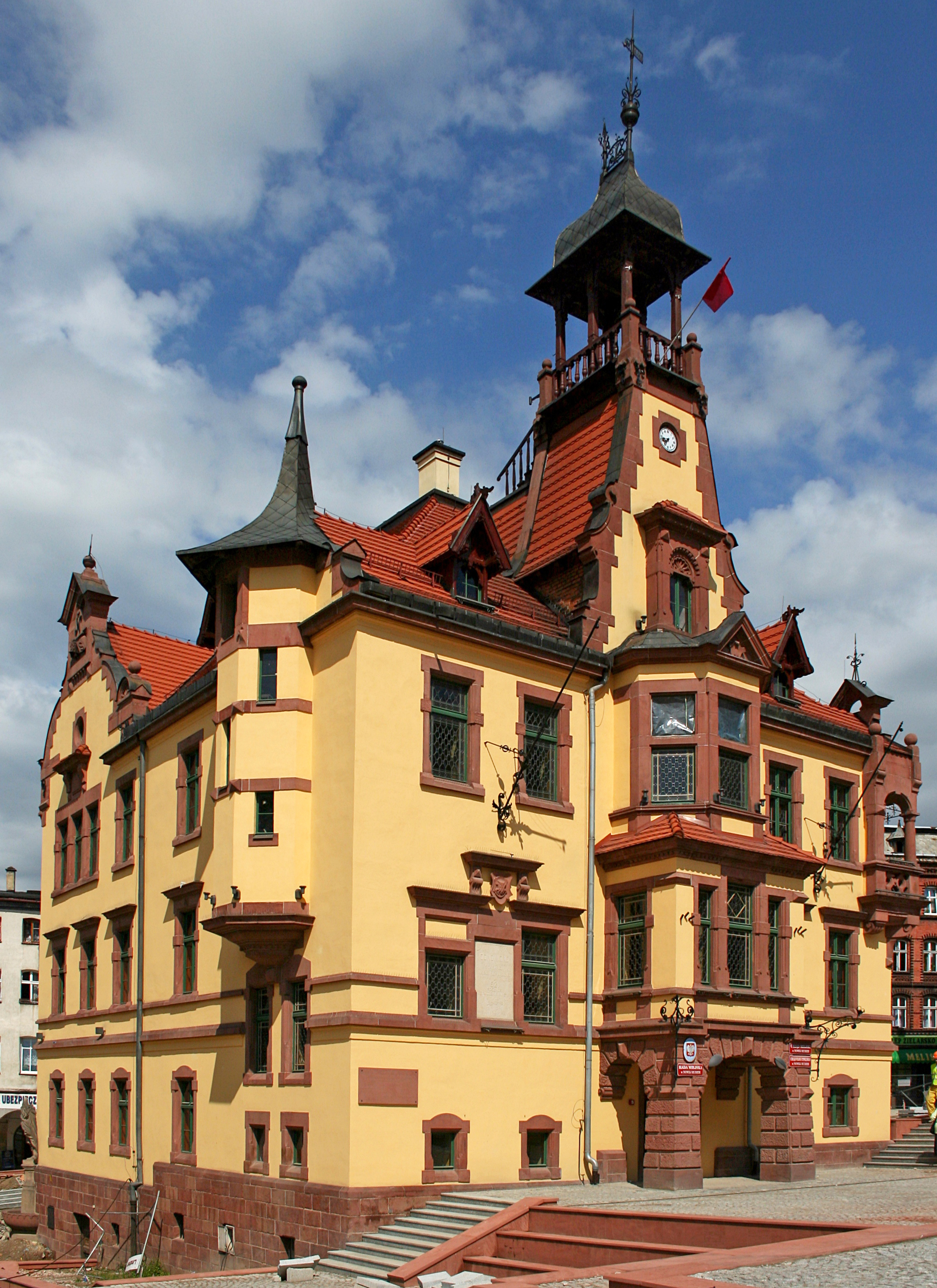 Ratusz w Nowej Rudzie